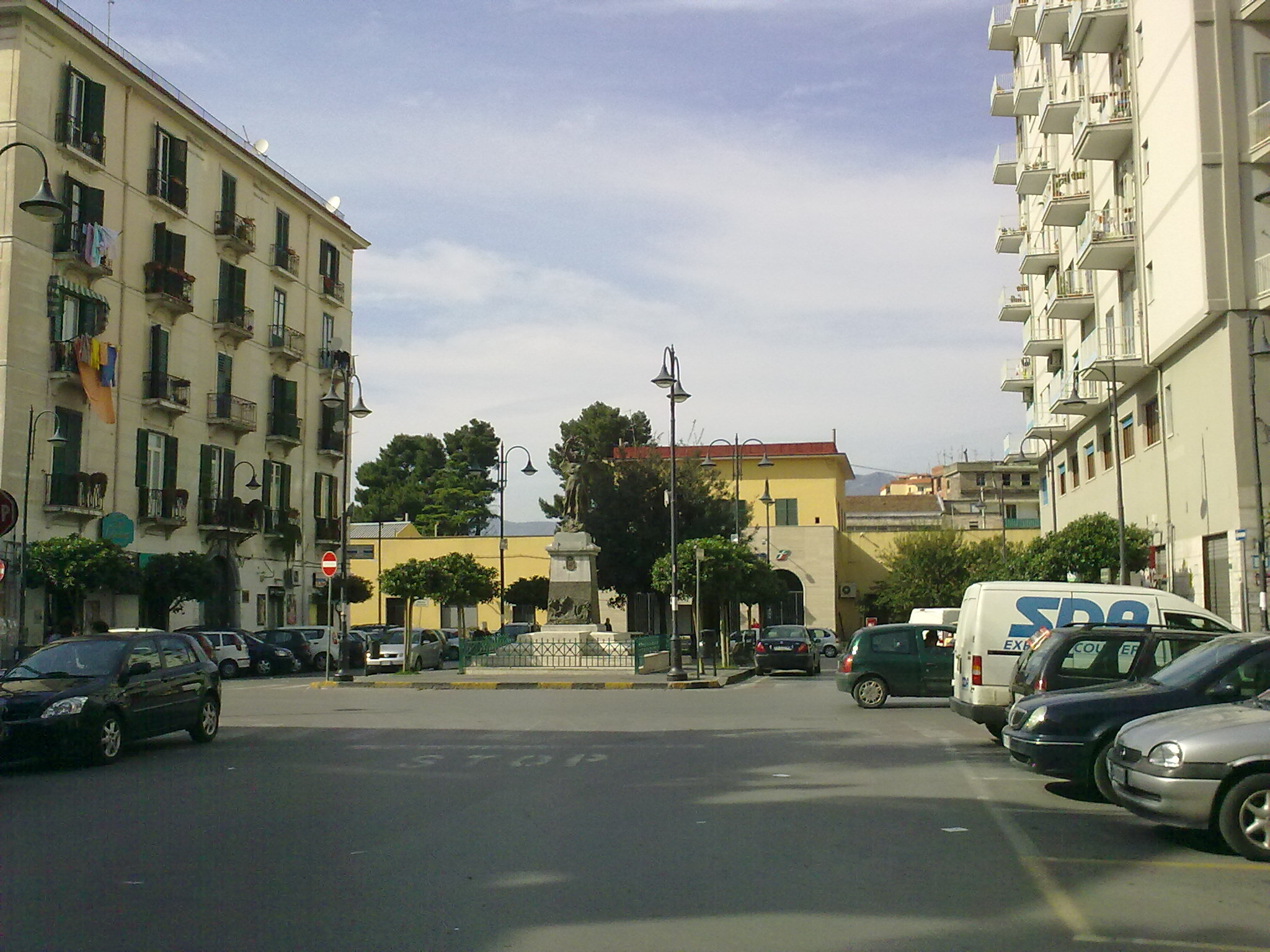 Piazza Trieste e Trento, Nocera Inferiore